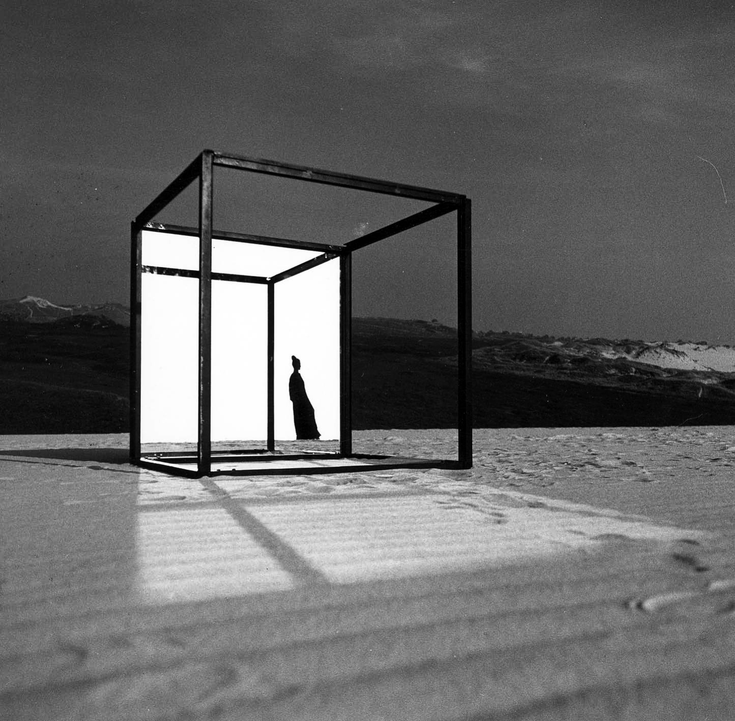 KUBUS 93 aus der vierteiligen Sequenz KUBUS 91-94, 1975